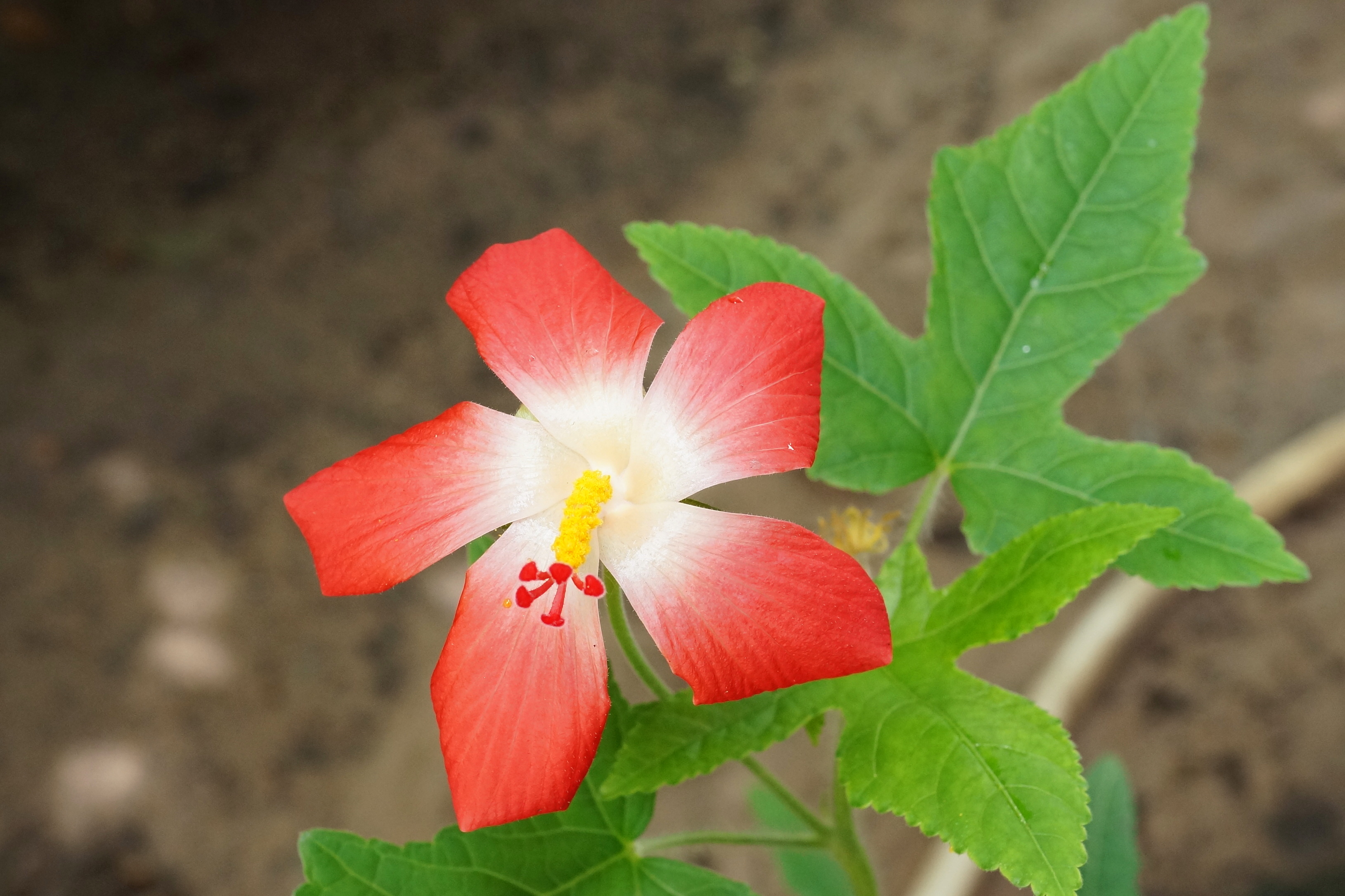 Abelmoschus sagittifolius (Kurz) Merr., 1924Tiếng Việt: Sâm bố chính